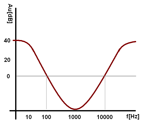 K největšímu útlumu dochází při frekvenci 1000Hz...